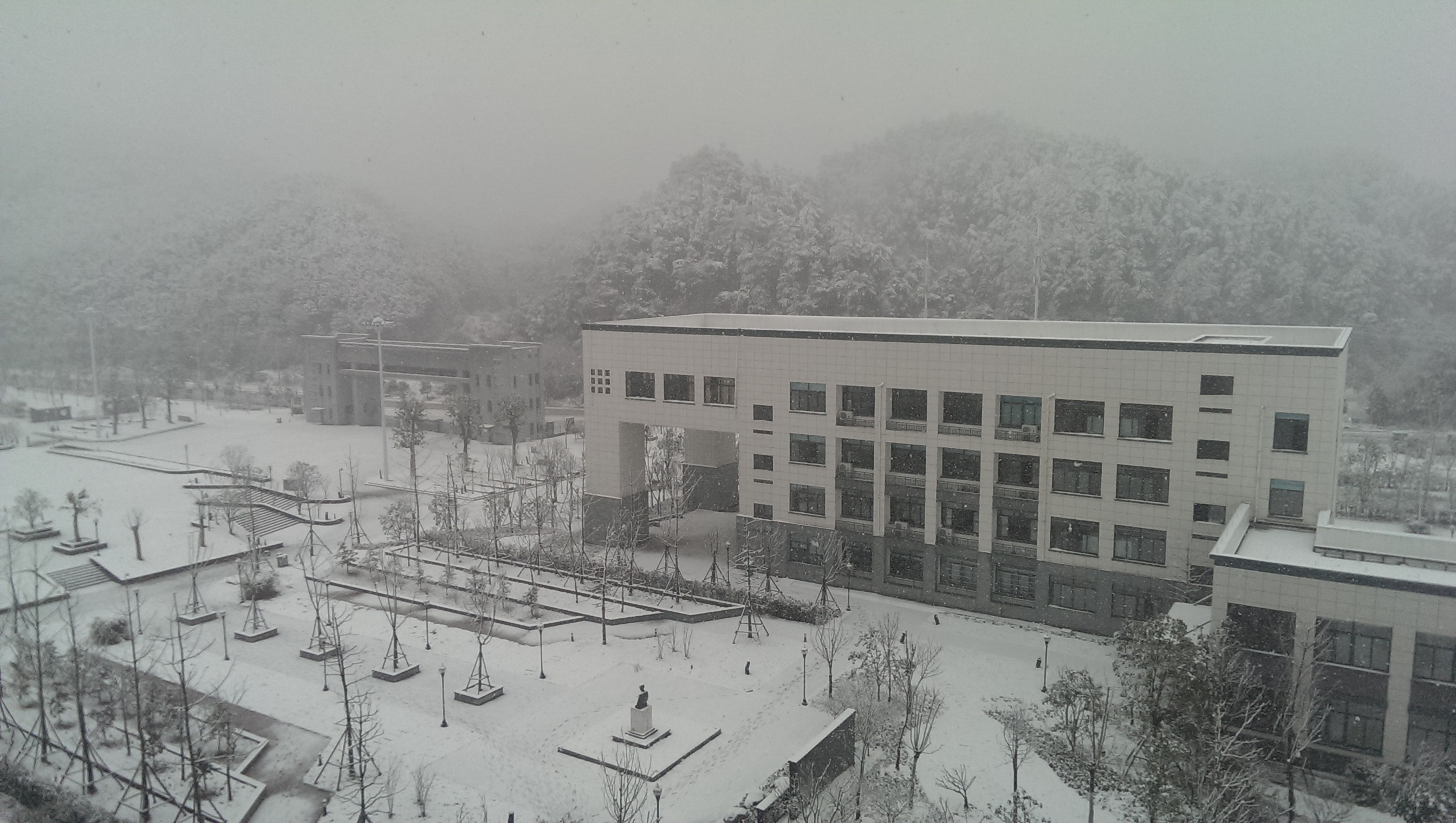 雪中的安徽省屯溪一中。